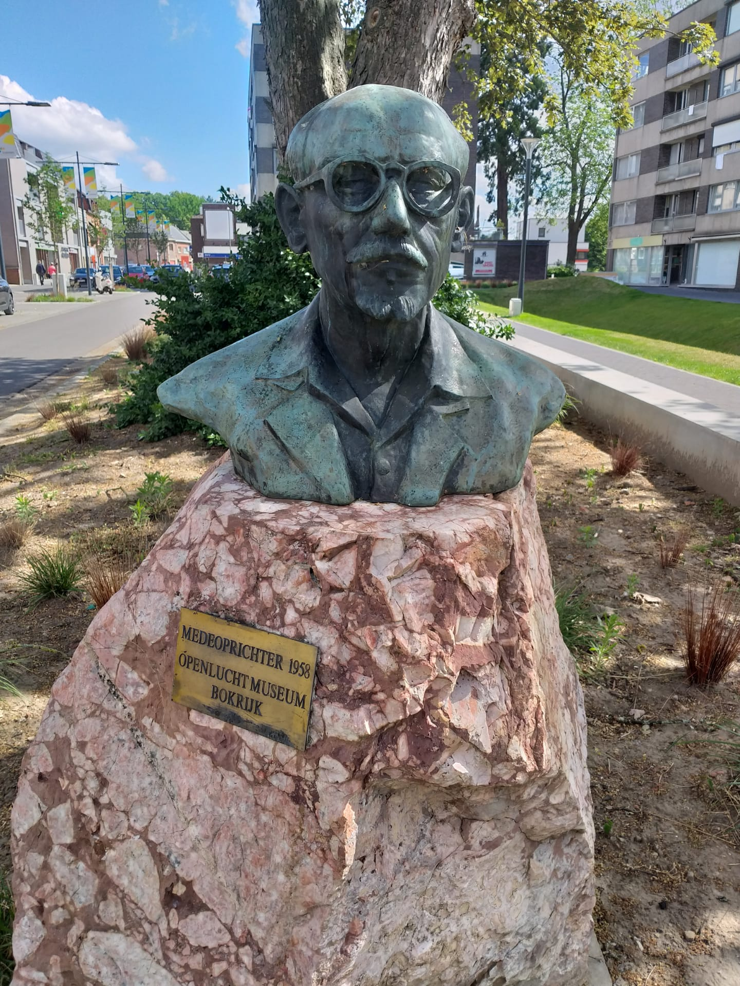 Standbeeld Charles Wellens te Lummen